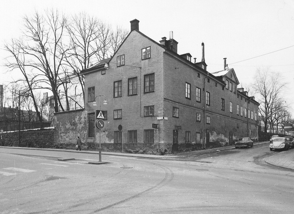 Hartwickska huset, hörnet Sankt Paulsgatan / Timmermangatan på Södermalm